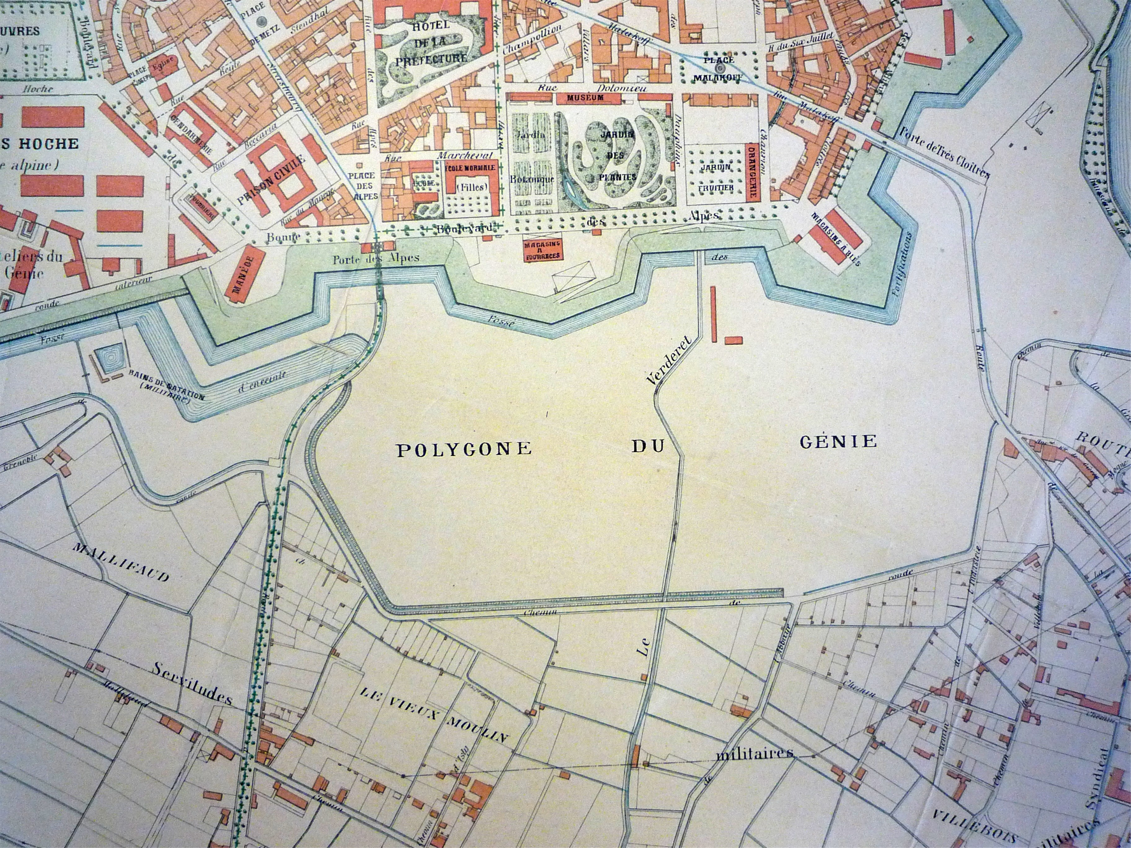 Extrait plan de Grenoble de 1902. Site du polygone du génie, futur emplacement du parc Paul Mistral. Les fortifications du général Haxo au nord datent de 1836. A l'extrême gauche, la rupture de ces remparts se rattache avec les remparts construits en 1879 partant en direction du Drac (emplacement du boulevard maréchal Joffre).